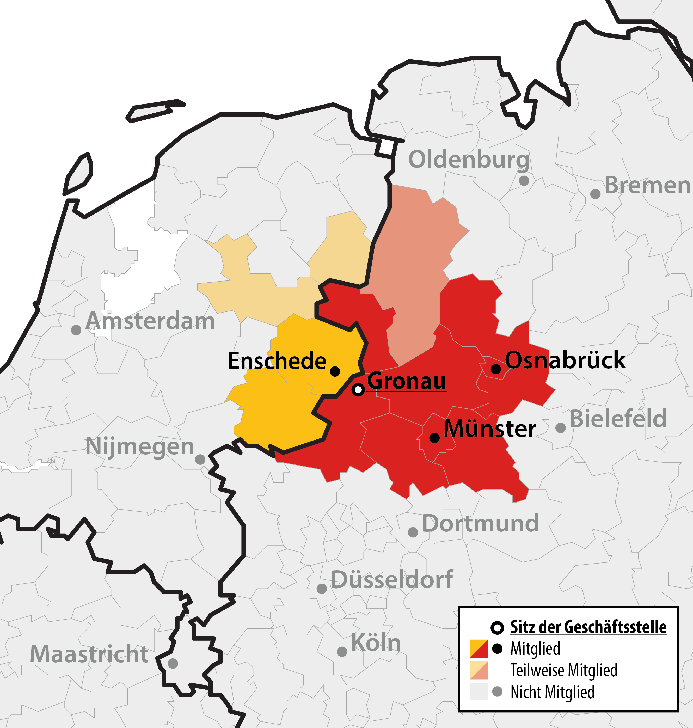 Karte der Mitglieder der Euregio (deutsch-niederländischer Kommunalverband)